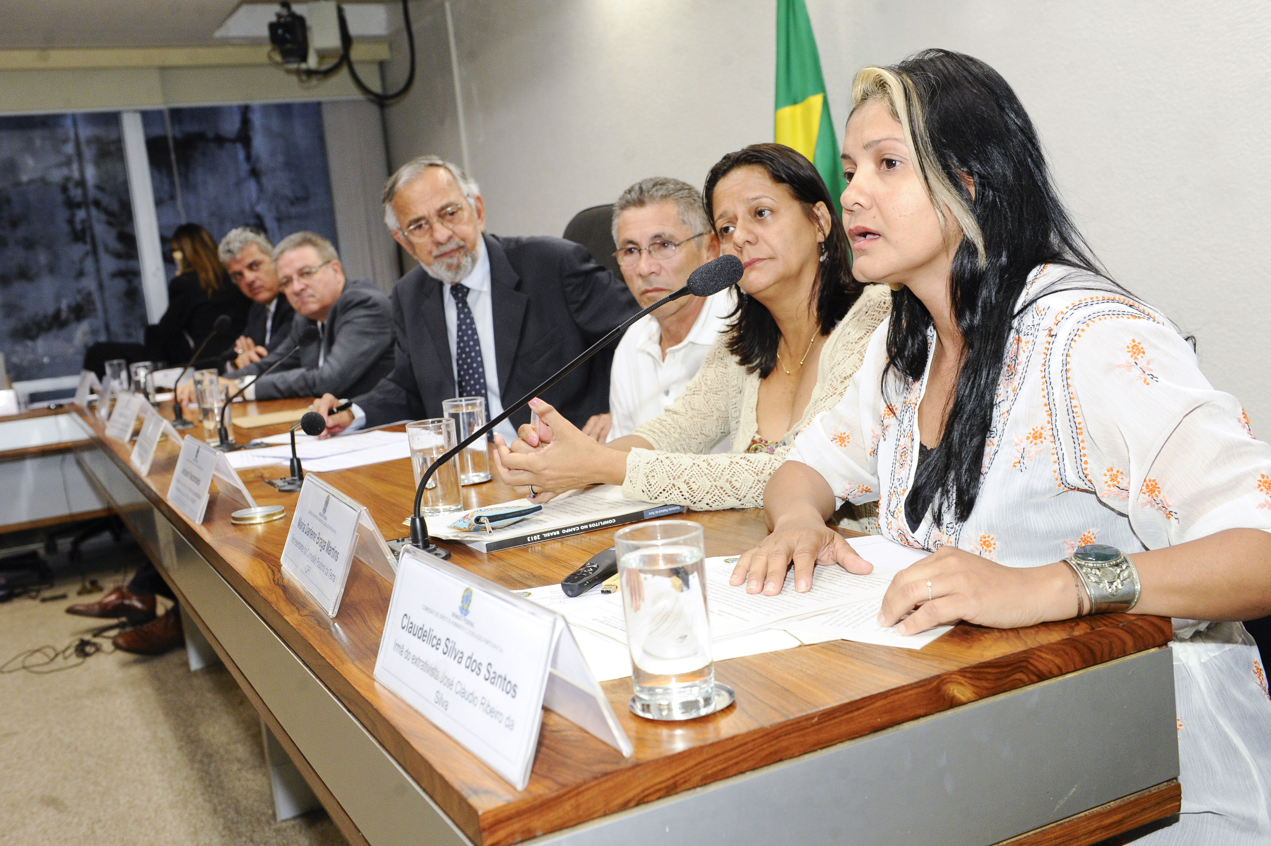 Sala de comissões do Senado Federal durante audiência pública da Comissão de Direitos Humanos e Legislação Participativa (CDH). Audiência pública sobre a escalada de violência contra ativistas de movimentos sociais de caráter socioambiental. Mesa (E/D): delegado da Polícia Federal da divisão de combate aos crimes ao meio ambiente do Ministério da Justiça, Adalton de Almeida Martins; diretor de Proteção Ambiental do Ibama, Luciano de Meneses Evaristo; coordenador de Campanha do Greenpeace, Marcio Astrini; vice-presidente da CDH, senador João Capiberibe (PSB-AP); presidente da Associação dos Produtores Agroextrativistas da Assembleia de Deus do Rio Ituxi (Apadriti), Antônio Vasconcelos; representante da Comissão Pastoral da Terra (CPT), Maria Darlene Braga Martins; irmã do extrativista José Cláudio Ribeiro da Silva, Claudelice Silva dos Santos Foto: Waldemir Barreto/Agência Senado